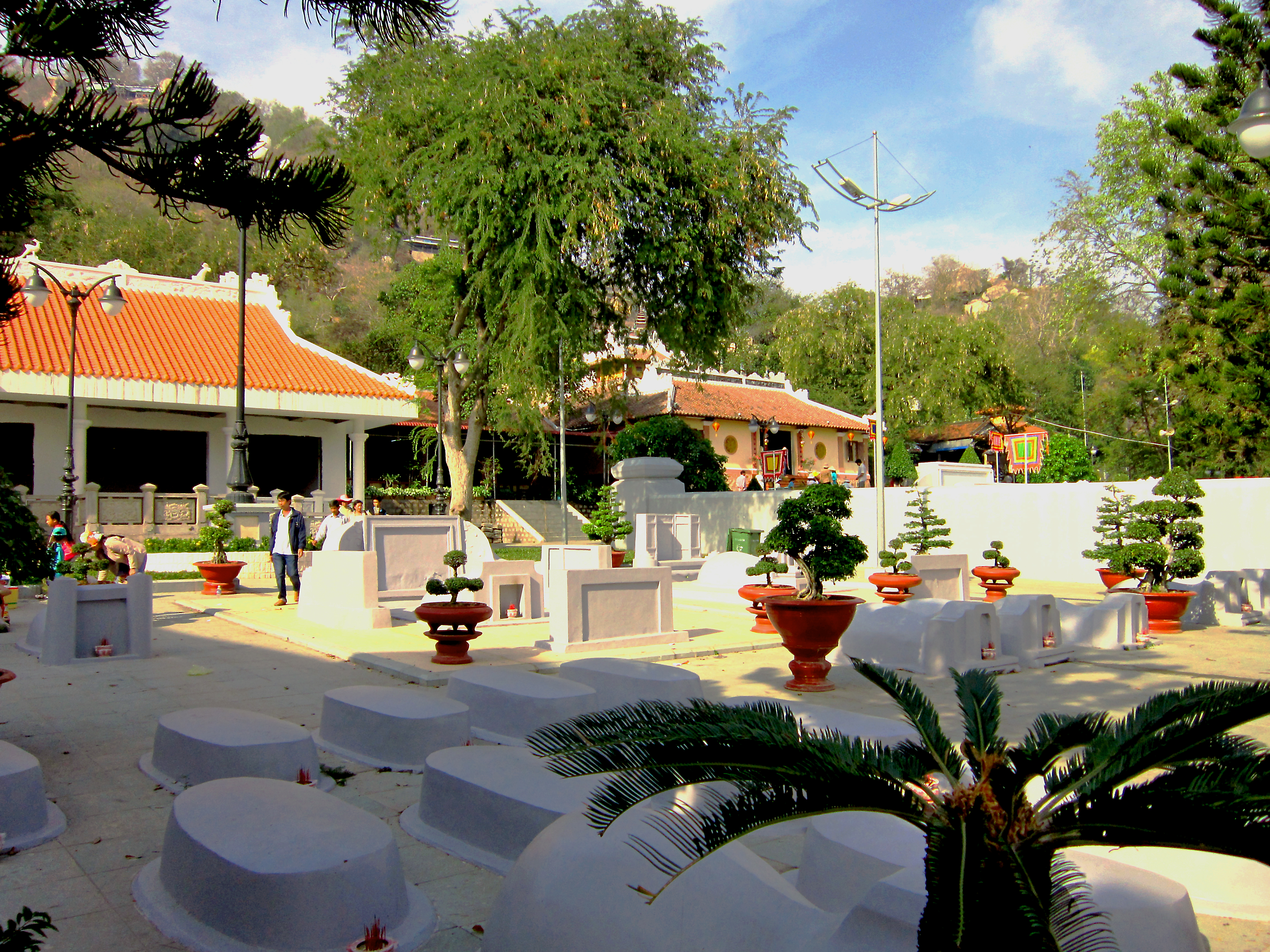 Lăng Thoại Ngọc Hầu ở núi Sam (An Giang, Việt Nam) vừa được trùng tu (ảnh chụp vào tháng 1 năm 2013).